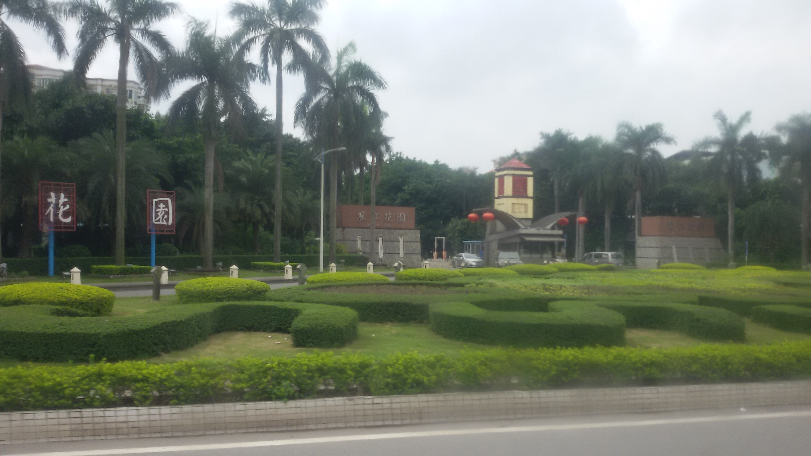 粵語: 番禺區麗江花園